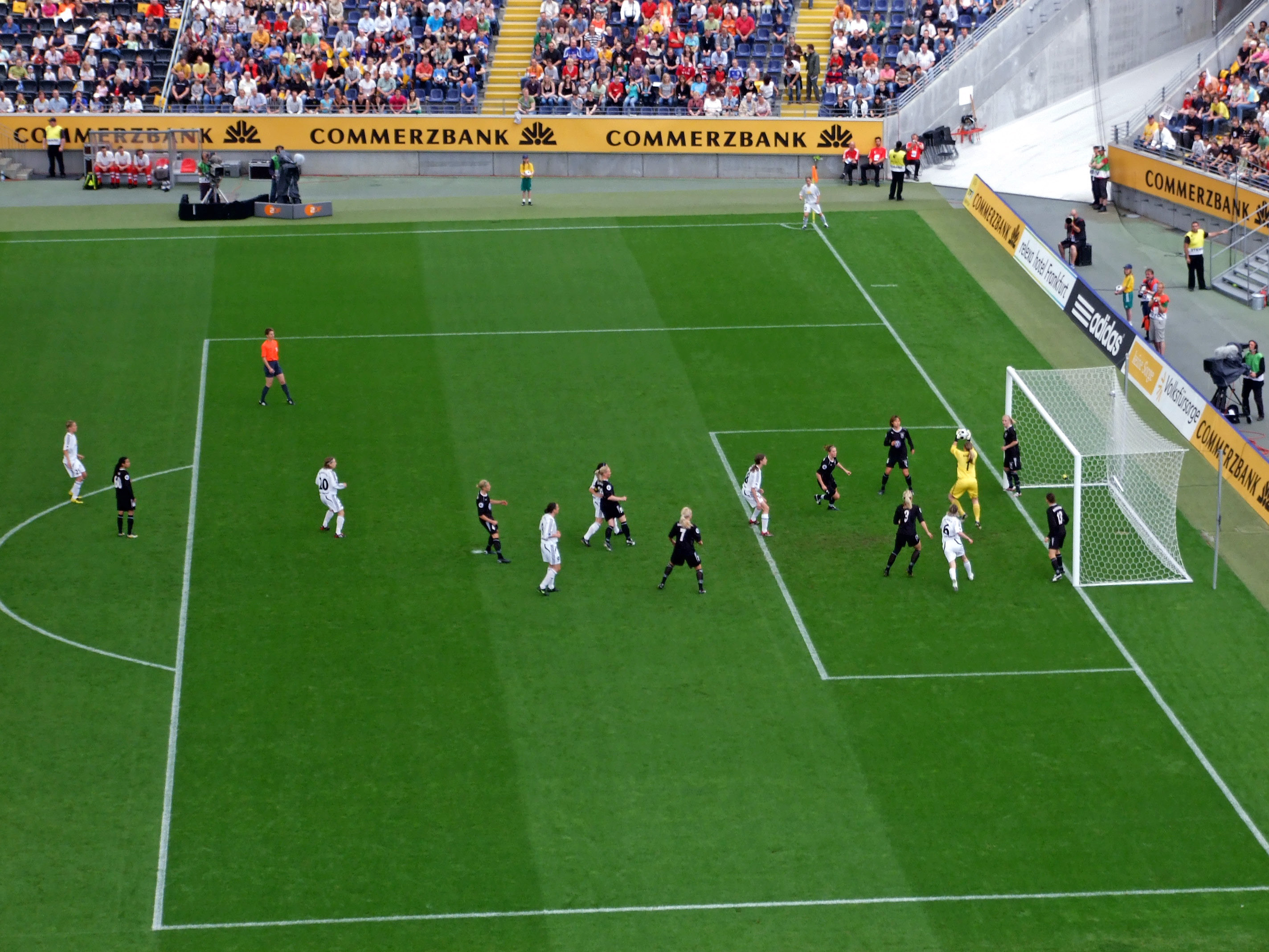 1. Halbzeit, Eckball von Meike Weber (1.FFC), gehalten von Ulla-Karin Rönnlund (Umeå), Commerzbank-Arena bei dem UEFA-Women's-Cup 2007/2008, Finalrückspiel zwischen 1. FFC Frankfurt und Umeå IK damfotboll